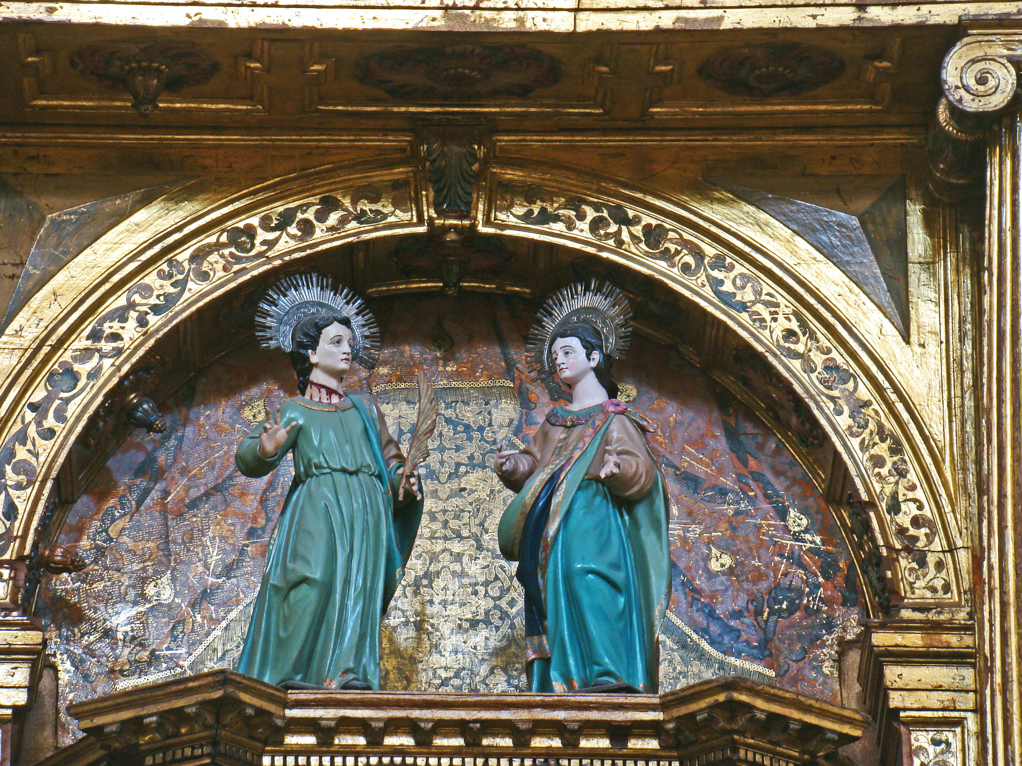 Esculturas de San Julián y Santa Basilisa procedentes de la desaparecida iglesia del mismo nombre, en Valladolid. En aquella iglesia se encontraban sobre el sagrario, lugar que ocupan también en su emplazamiento nuevo en la parroquia de San Miguel y San Julián en Valladolid.